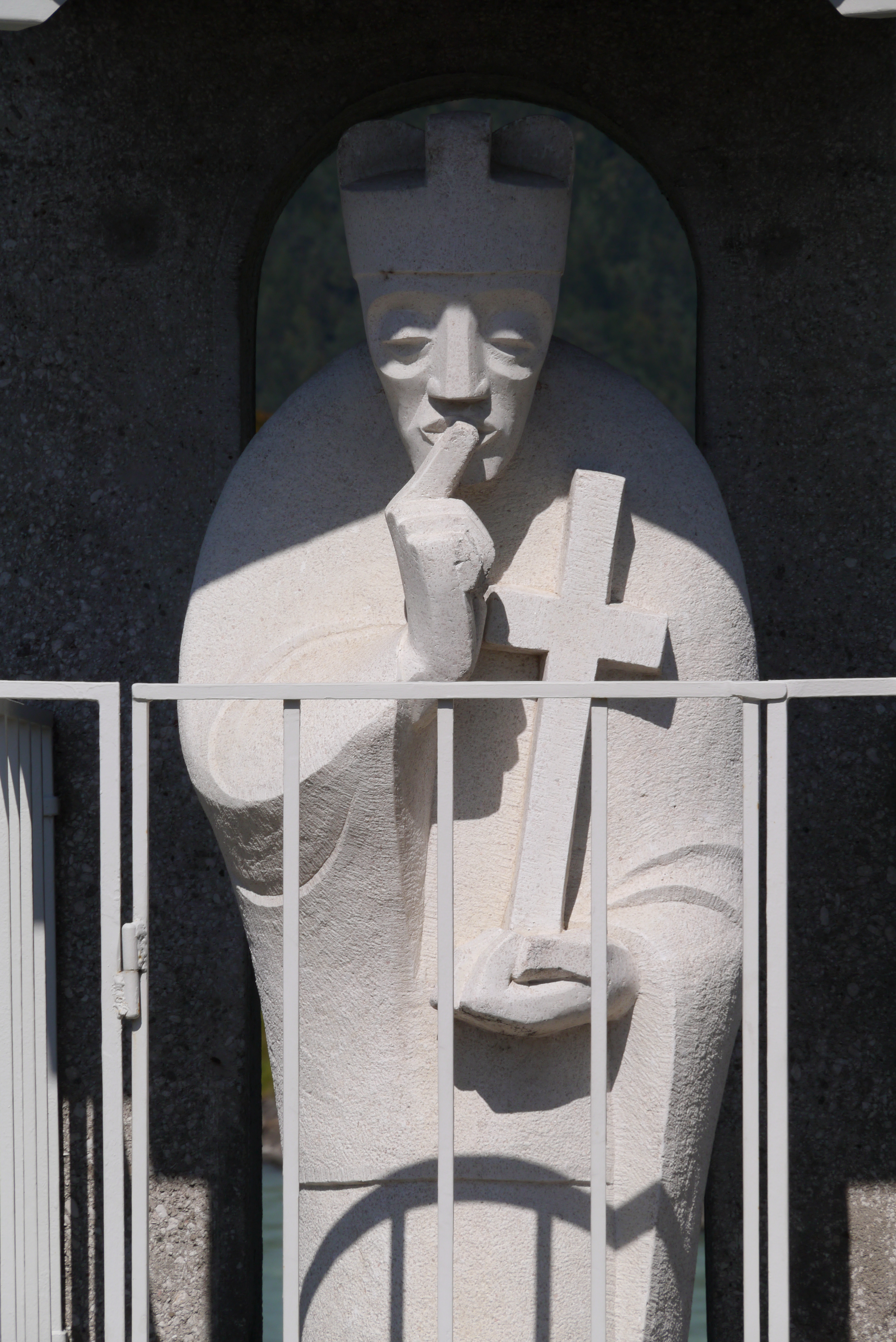 Figurenbildstock hl. Johannes Nepomuk, Schwaz, Detail, Blick von Süden